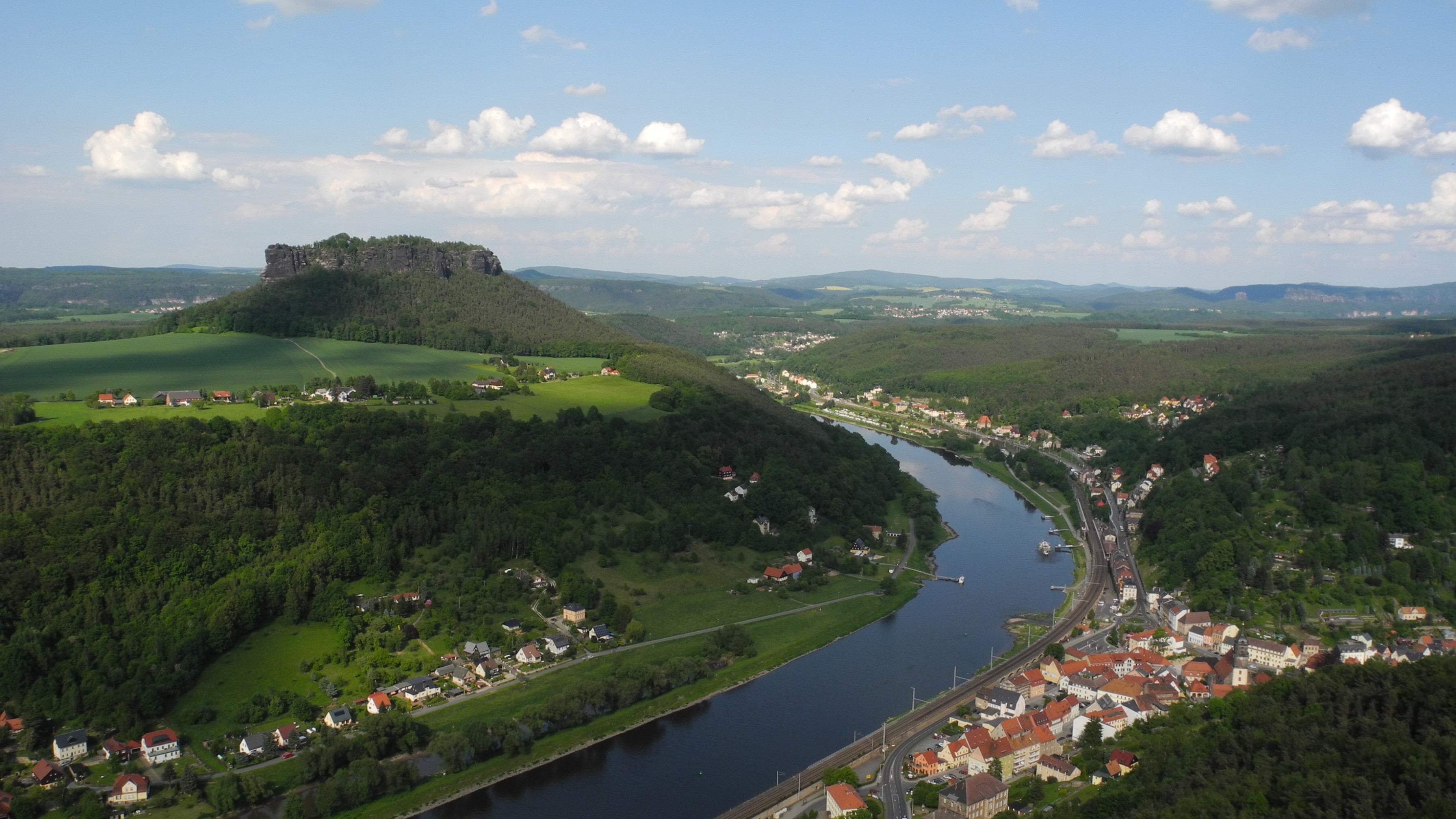 Königstein-Sächsische Schweiz - Sicht auf Ort und Lilienstein von der Festung